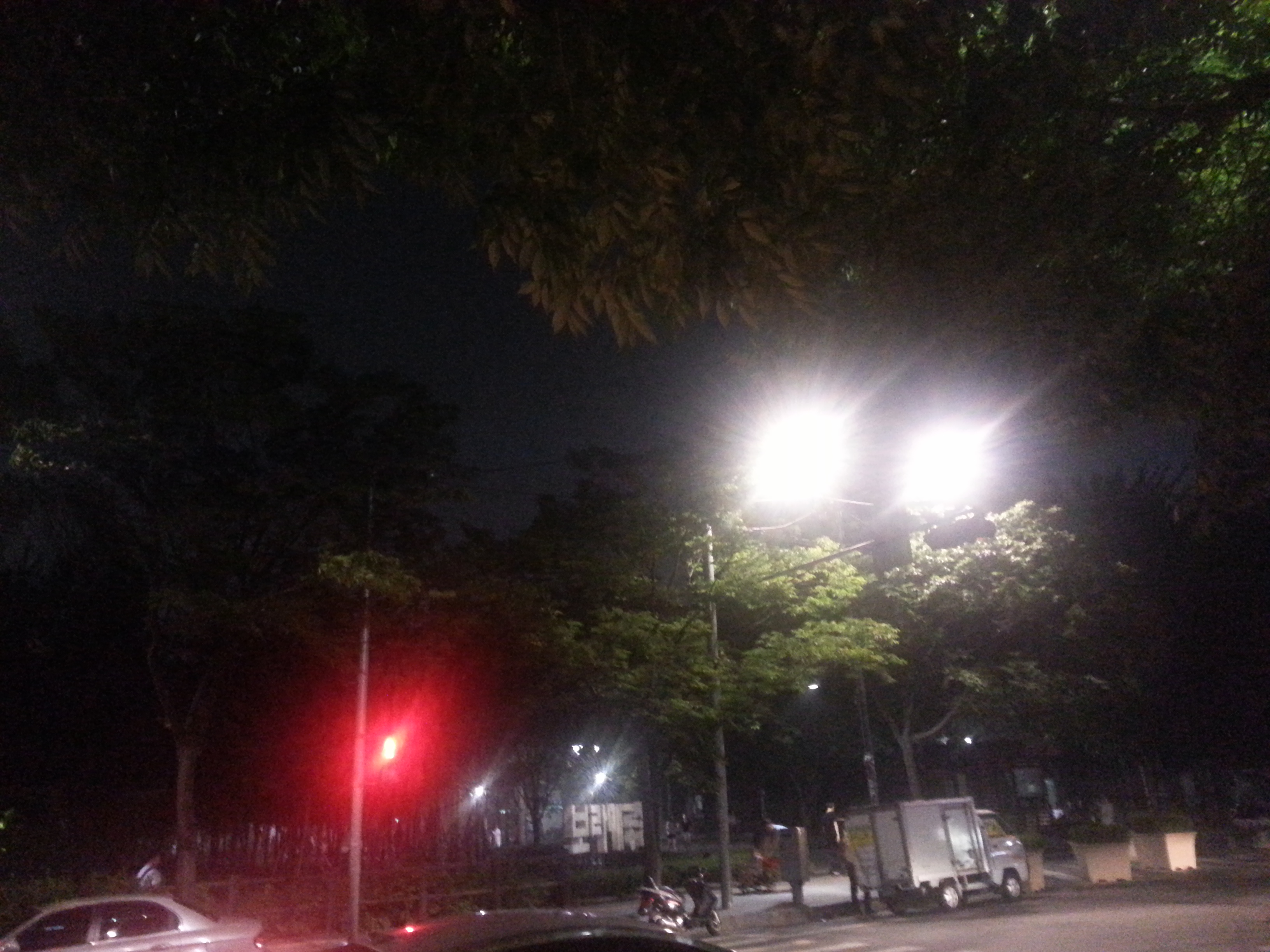 2014년 7월 14일 보라매공원